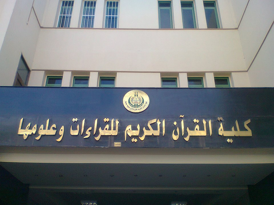 كلية القرأن الكريم بطنطا